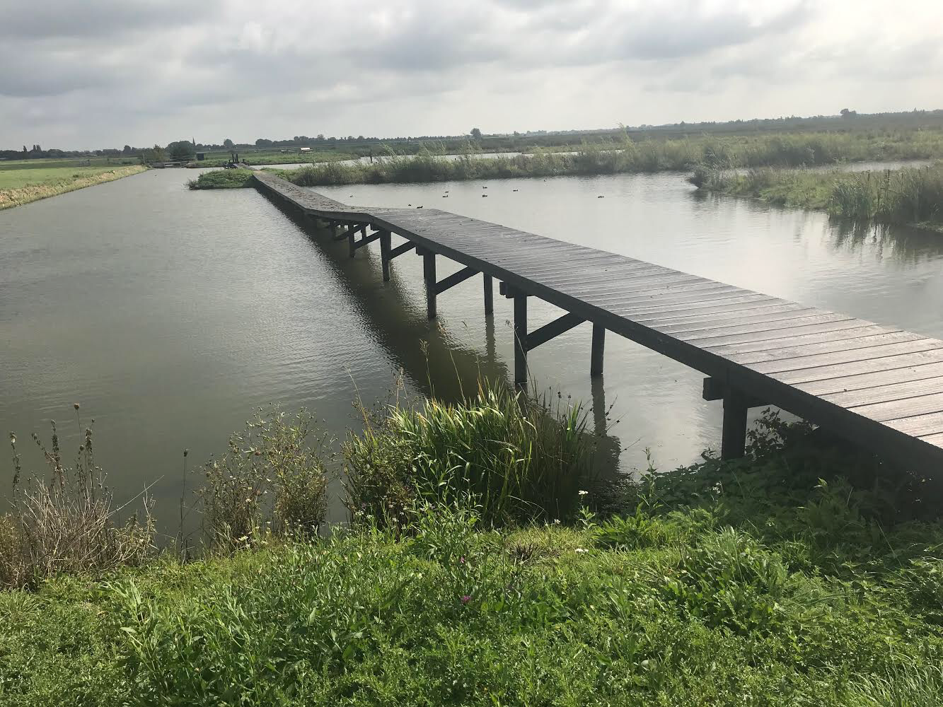 Waterbergings- en inundatiegebied Blokhoven, vlonderpad, 14 september 2019